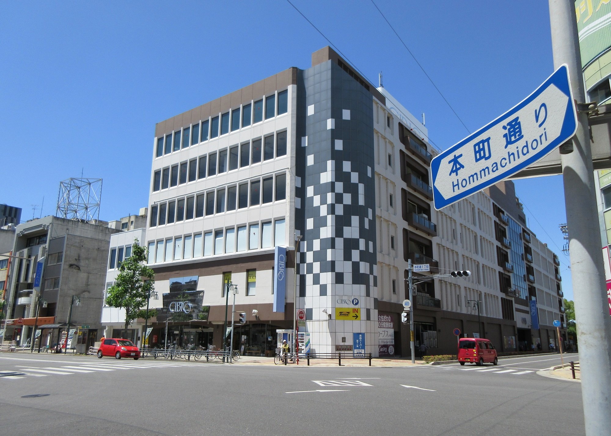 本町一丁目交差点（岡崎市本町通）